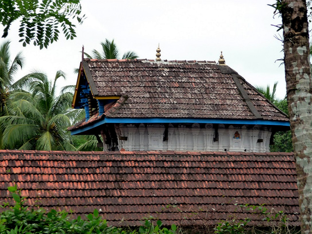 ശ്രീകോവിൽ - തൃക്കണ്ടിയൂർ - തിരൂർ